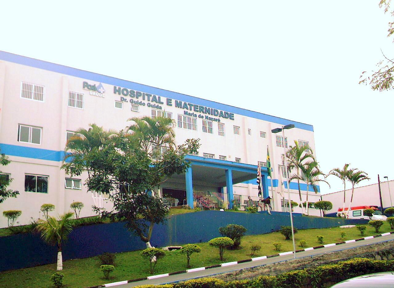 Hospital de Poá